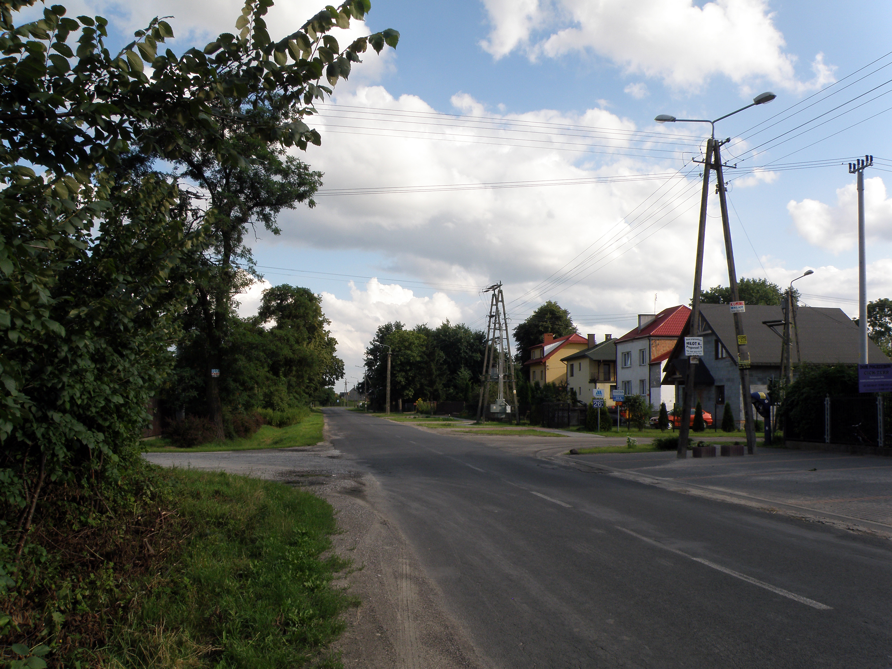 Sobiekursk - województwo mazowieckie, powiat otwocki, gmina Karczew.